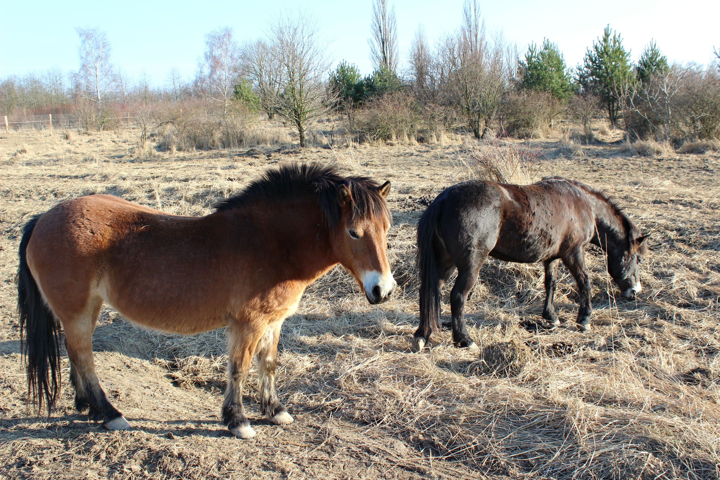 Exmoorští pony v Přírodní rezervaci Milovice.